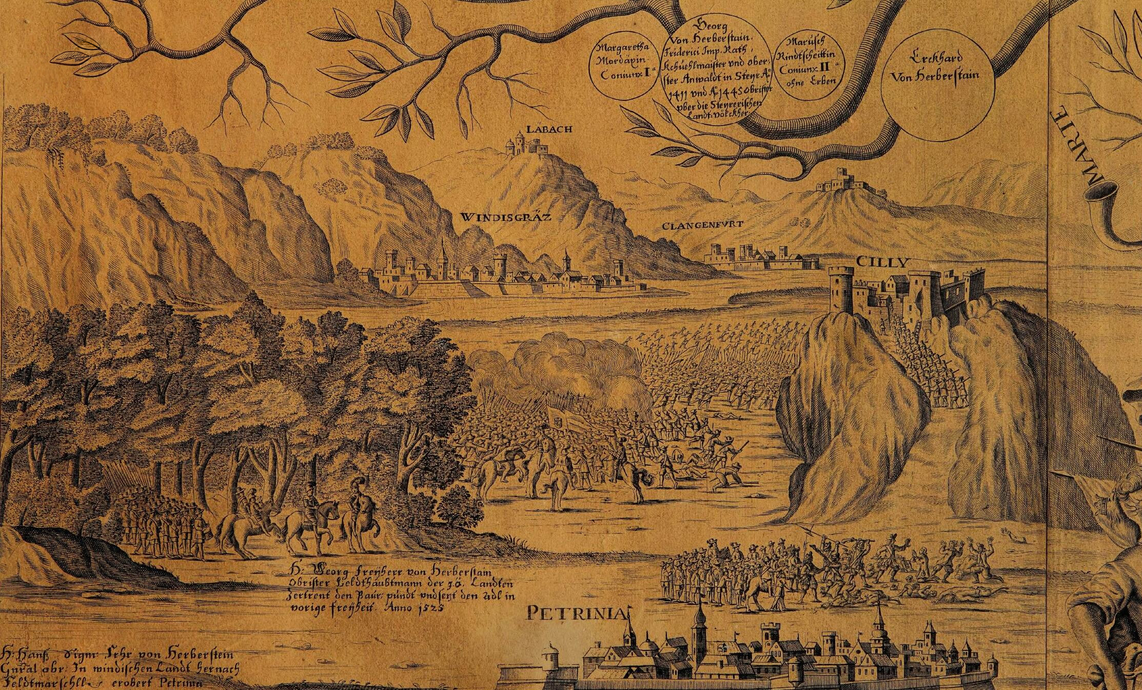 Bitka pri Celju - detajl iz genealoškega debla plemiške rodbine Herberstein, 1715, devet listov, prilepljenih na platno, Zgodovinski arhiv na Ptuju..